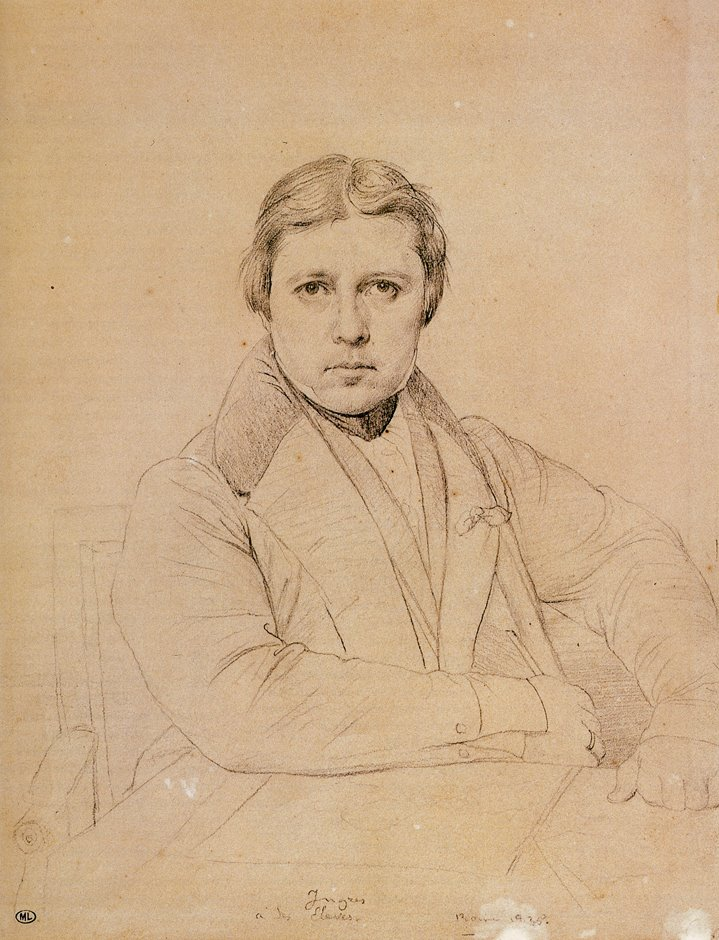 Jean-Auguste-Dominique Ingres, Autoportrait dessin au crayon sur papier 1835 musée du Louvre